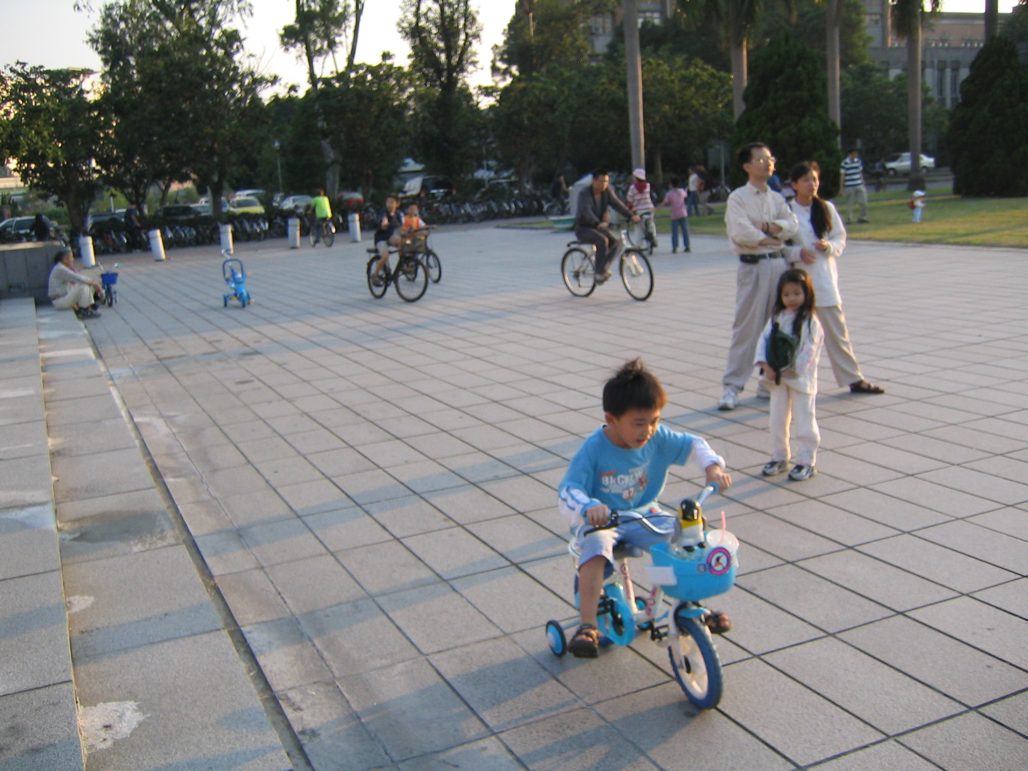 在國立臺灣大學玩耍的小孩。